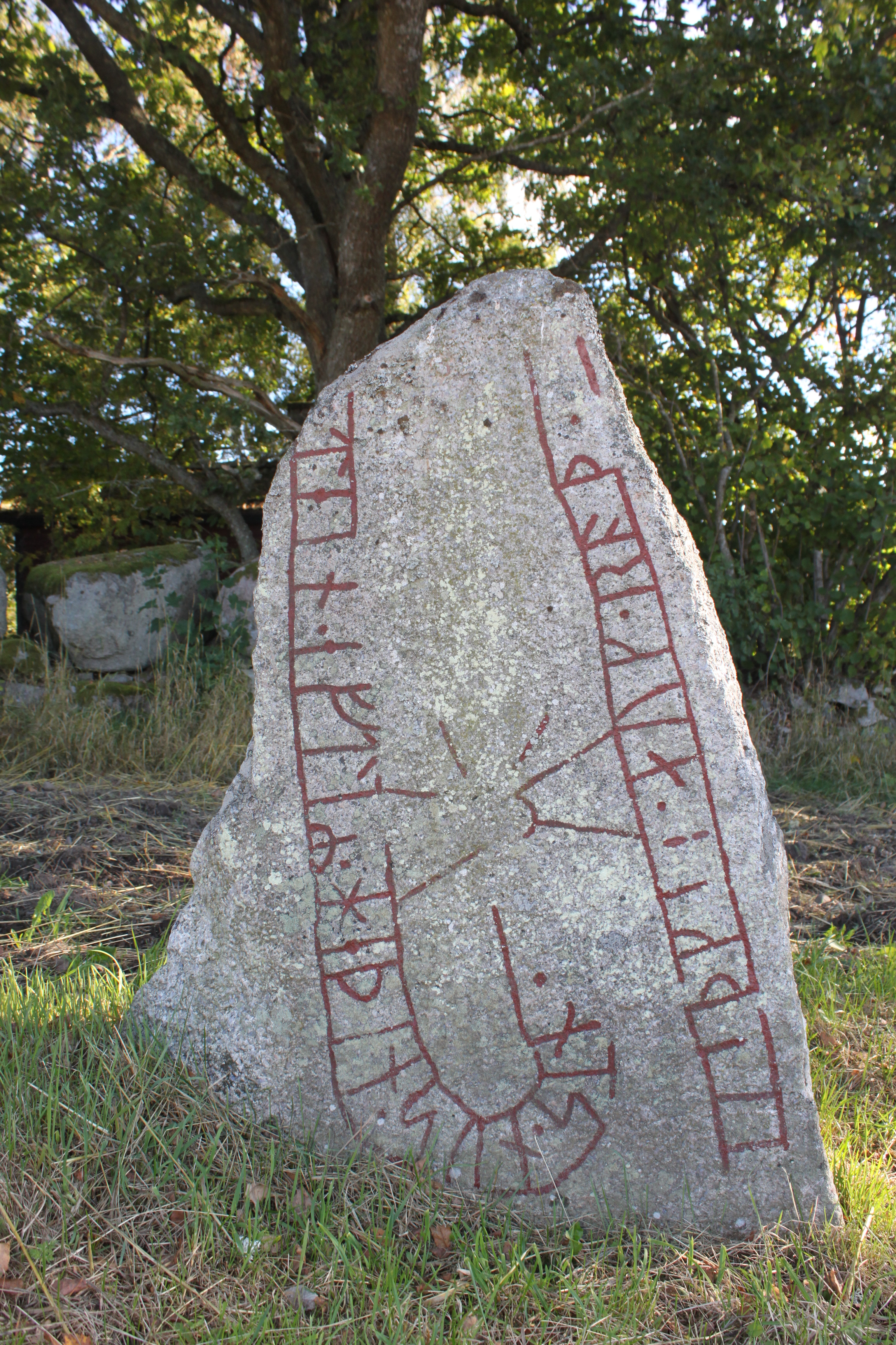 Dänningelanda 3:1. Runristning. Fast fornlämning. (Sm 8).